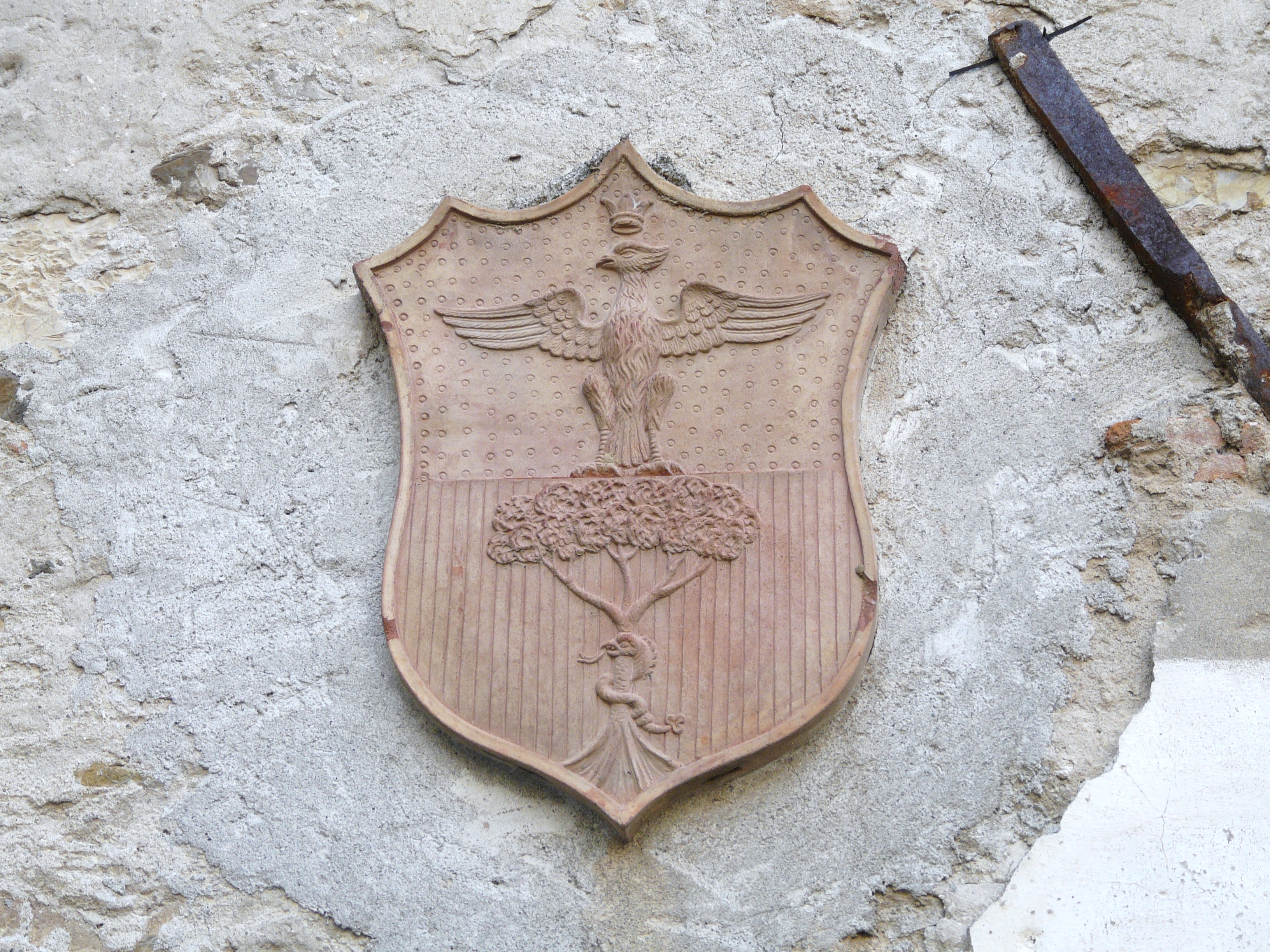 Bolano, Liguria, Italia